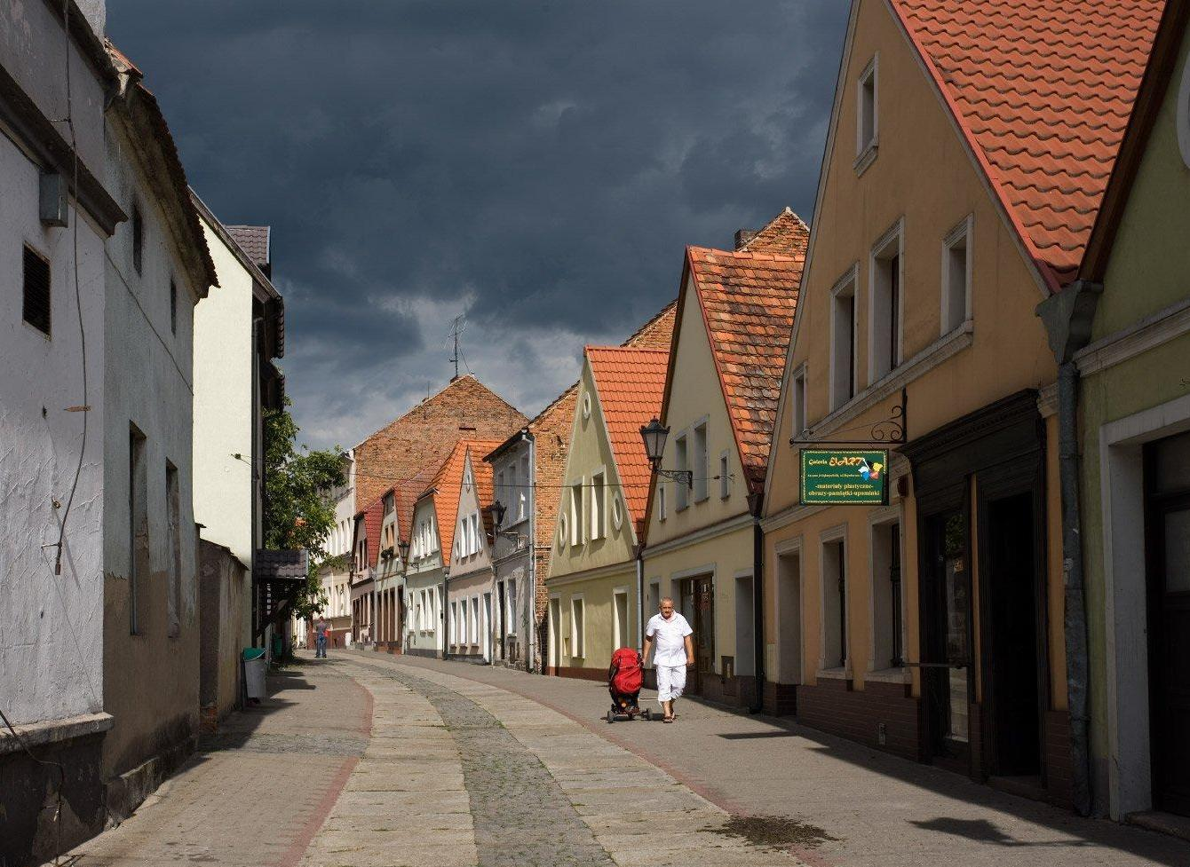 Ulica Rynkowa dochodzi do rynku. Zwarta zabudowa jest przerwana w połowie długości ulicy i między starannie wyremontowaną kamienicą z elewacją w kolorze kremowym, a następną - piętrową jest przerwa. To gaska, czyli wąska ulica. Prowadzi w kierunki jeziora, stanowiąc doskonały skrót dla pieszych.